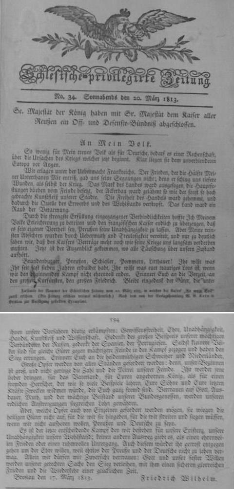 An Mein Volk - Seine Majestät der König haben mit Seiner Majestät dem Kaiser aller Reußen ein Off-und Defensiv-Bündnis abgeschlossen. Schlesische privilegierte Zeitung vom 20. März 1813, Seiten 593 und 594.